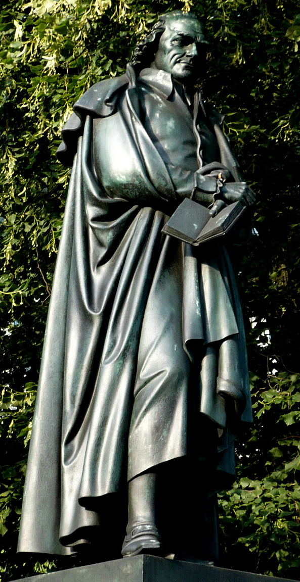 Lorenz von Westenrieder (* 1. August 1748 in München; † 15. März 1829 in München) war ein deutscher Historiker und Schriftsteller. Er gilt als Wiederentdecker der bayerischen Vorgeschichte, beschäftigte sich aber auch mit seiner Gegenwart. Denkmal am Promenadeplatz in München.